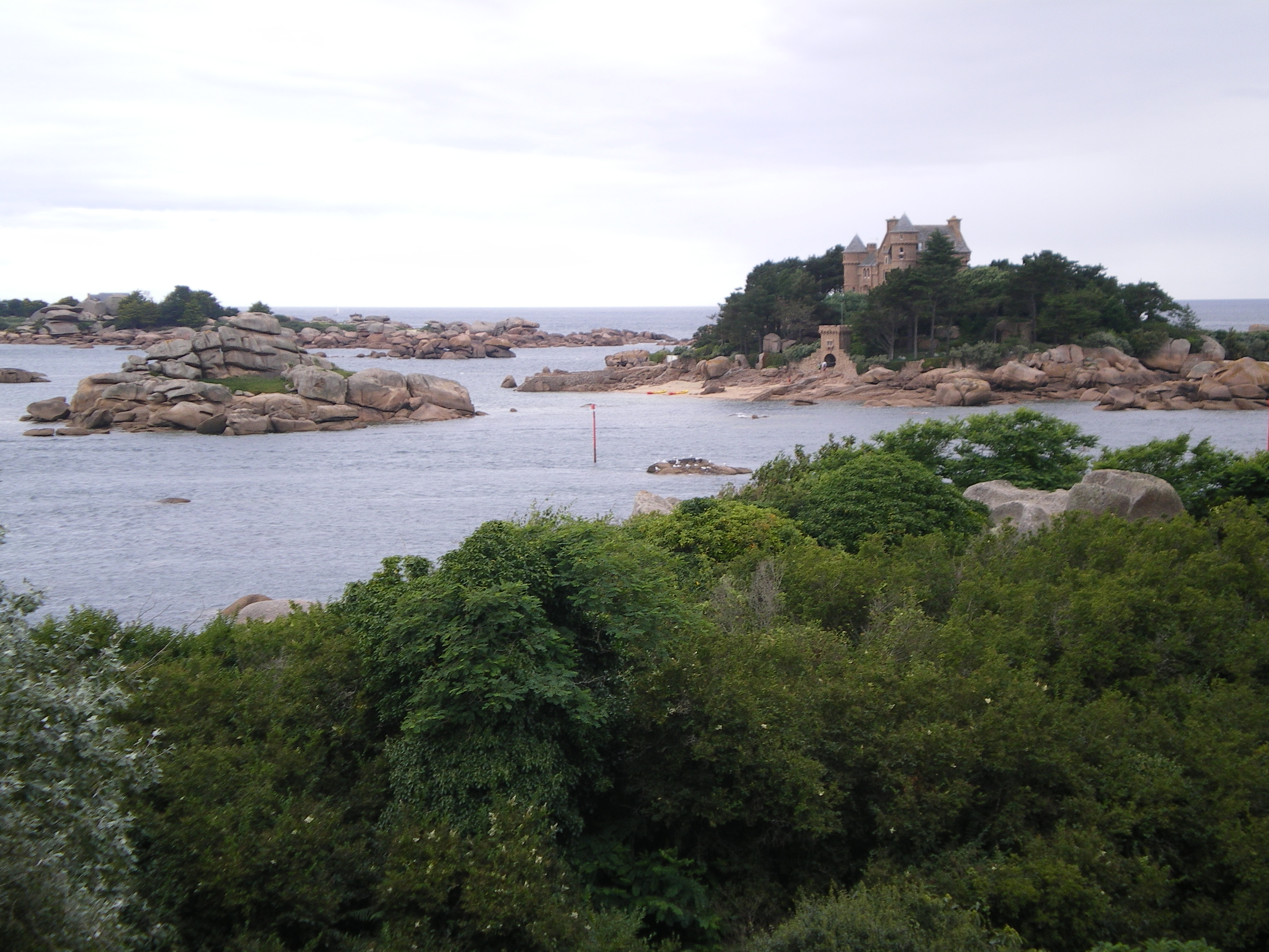 Château de Costaeres